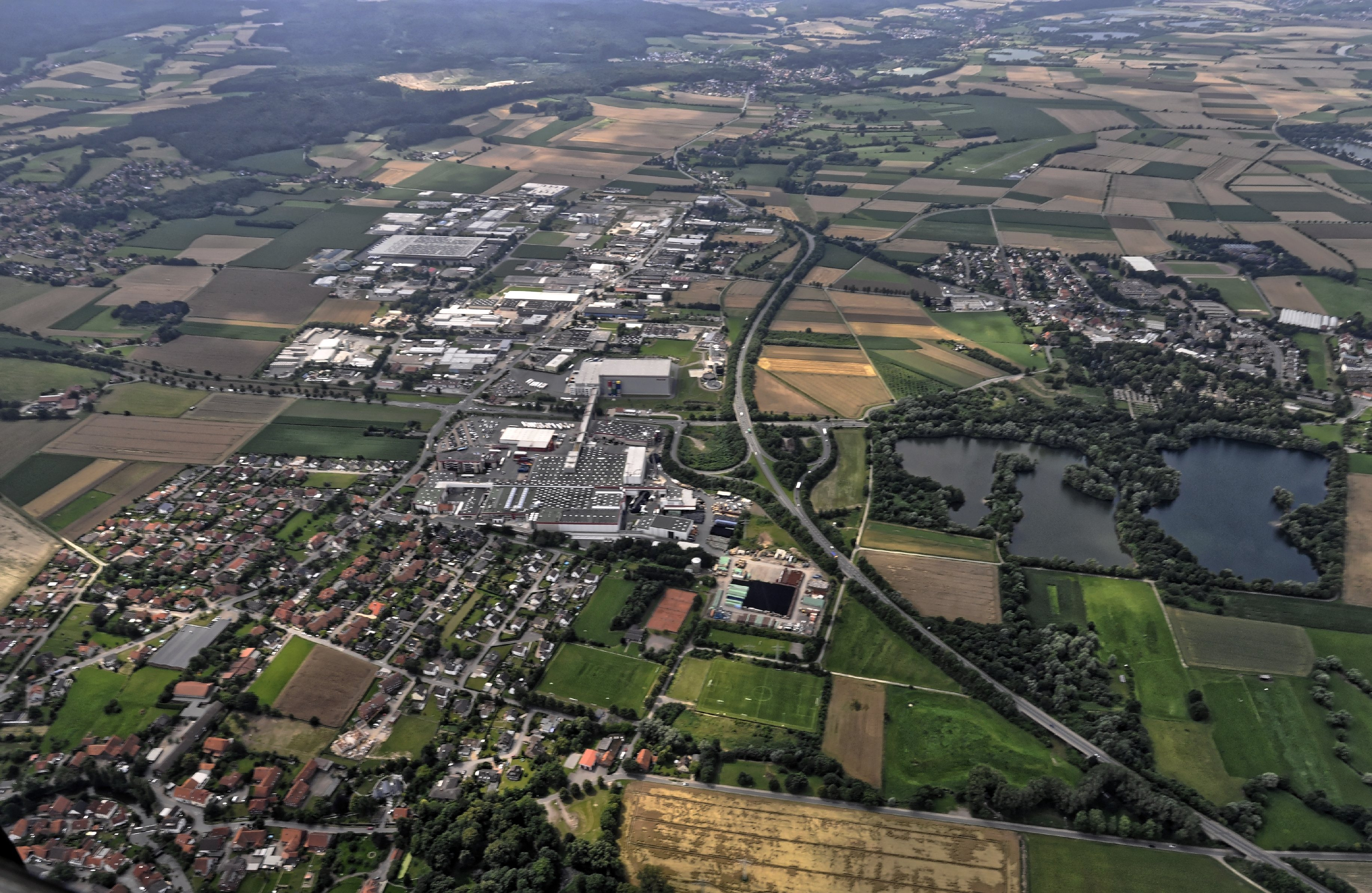 Bilder vom Flug Nordholz-Hammelburg 2015: Exten.